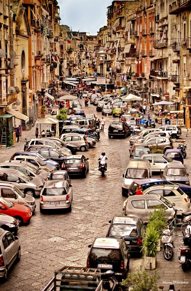 Foto dall'alto del Borgo di Sant'Antonio Abate.